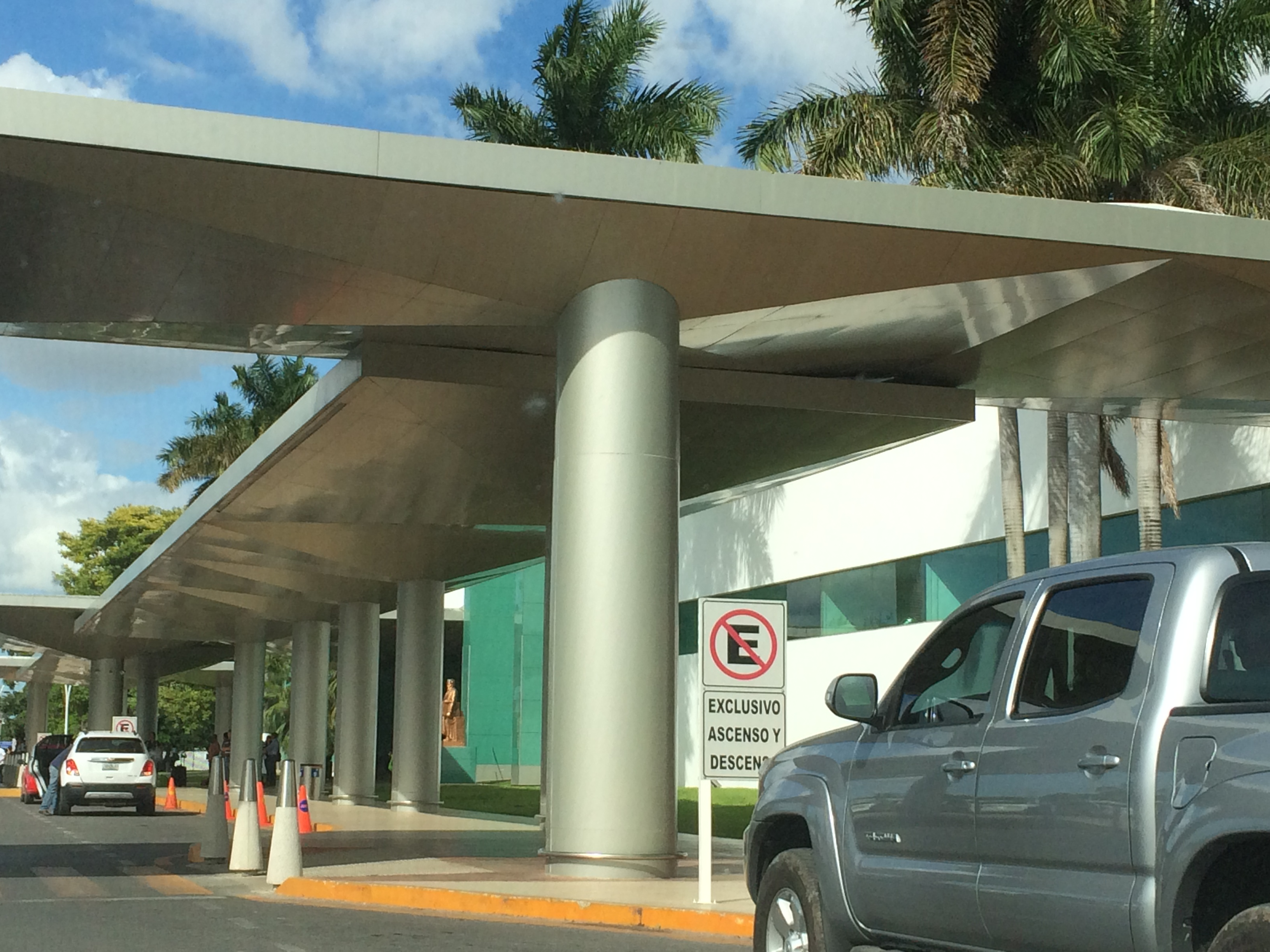 Exterior del Aeropuerto de Mérida.